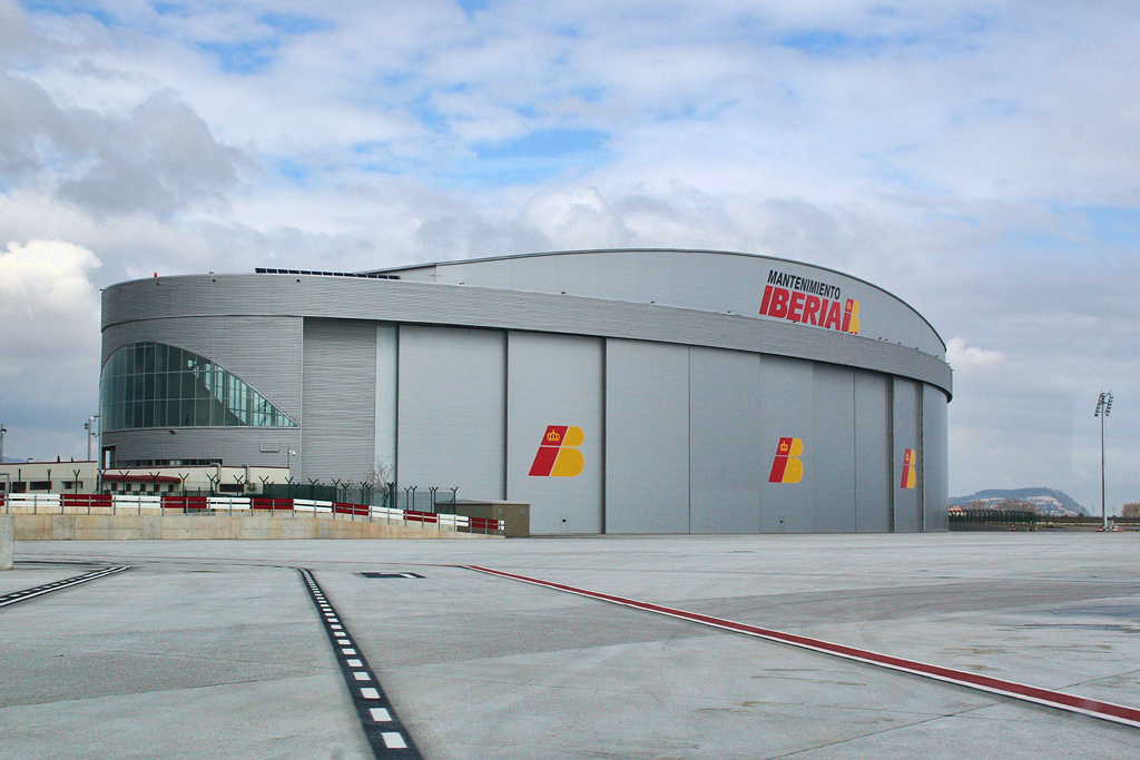 Iberia Maintenance Hangar